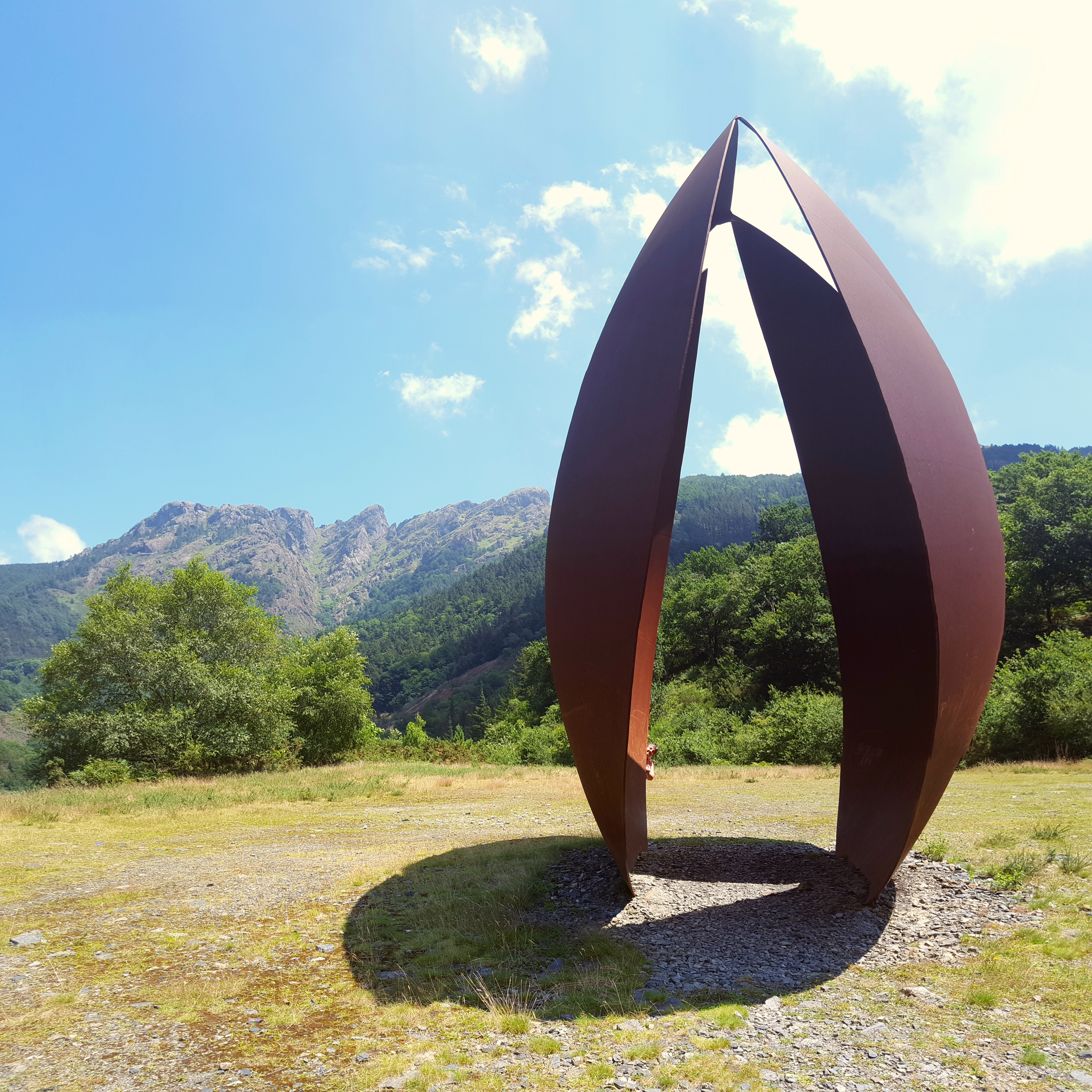 Erabatekoa eta ezdeusa Sorburua. Imanol Marrodan-en eskultura Arditurri-n